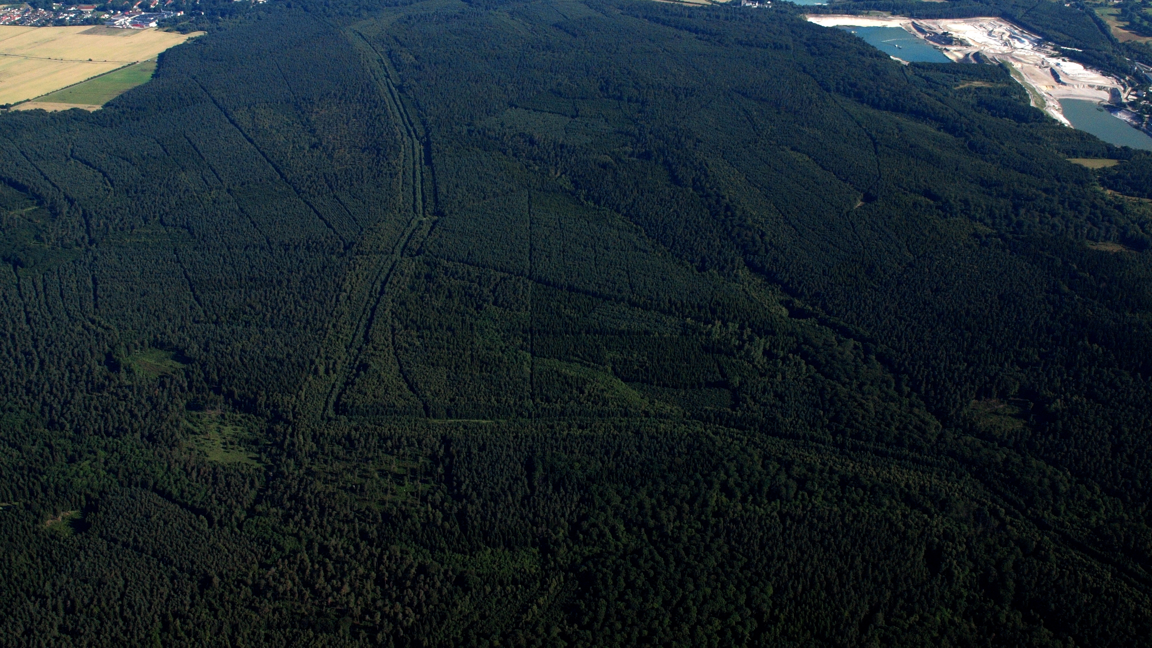 Grünes Band, ehemalige Grenze bei Helmstedt, Luftaufnahme (2014)